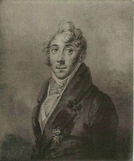 Александр Яковлевич Булгаков (1781—1863) — дипломат, сенатор, московский почт-директор.